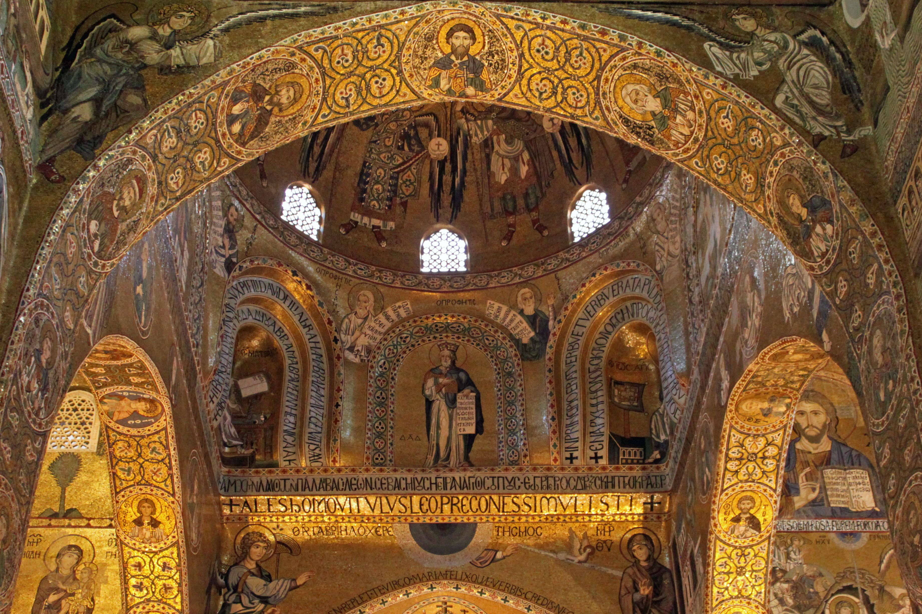 Палатинская капелла, Палермо, Италия. Нижняя часть купола